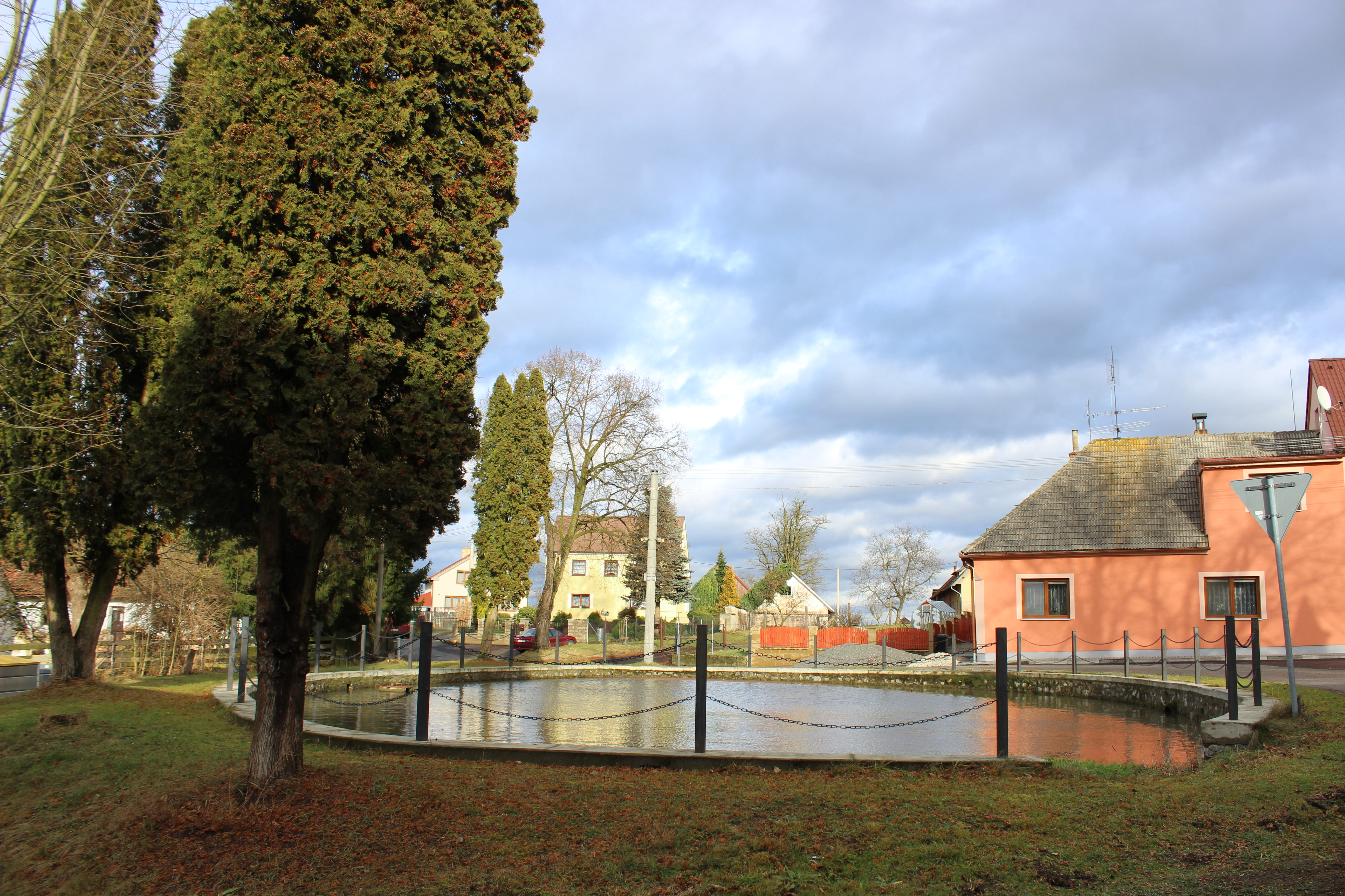 Požární nádrž - návesní rybník. Chabrovice (německy Chabrowitz) - část obce Skopytce v okrese Tábor. Česká republika.